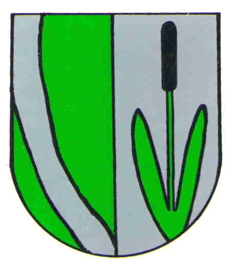 Wappen Wasserliesch